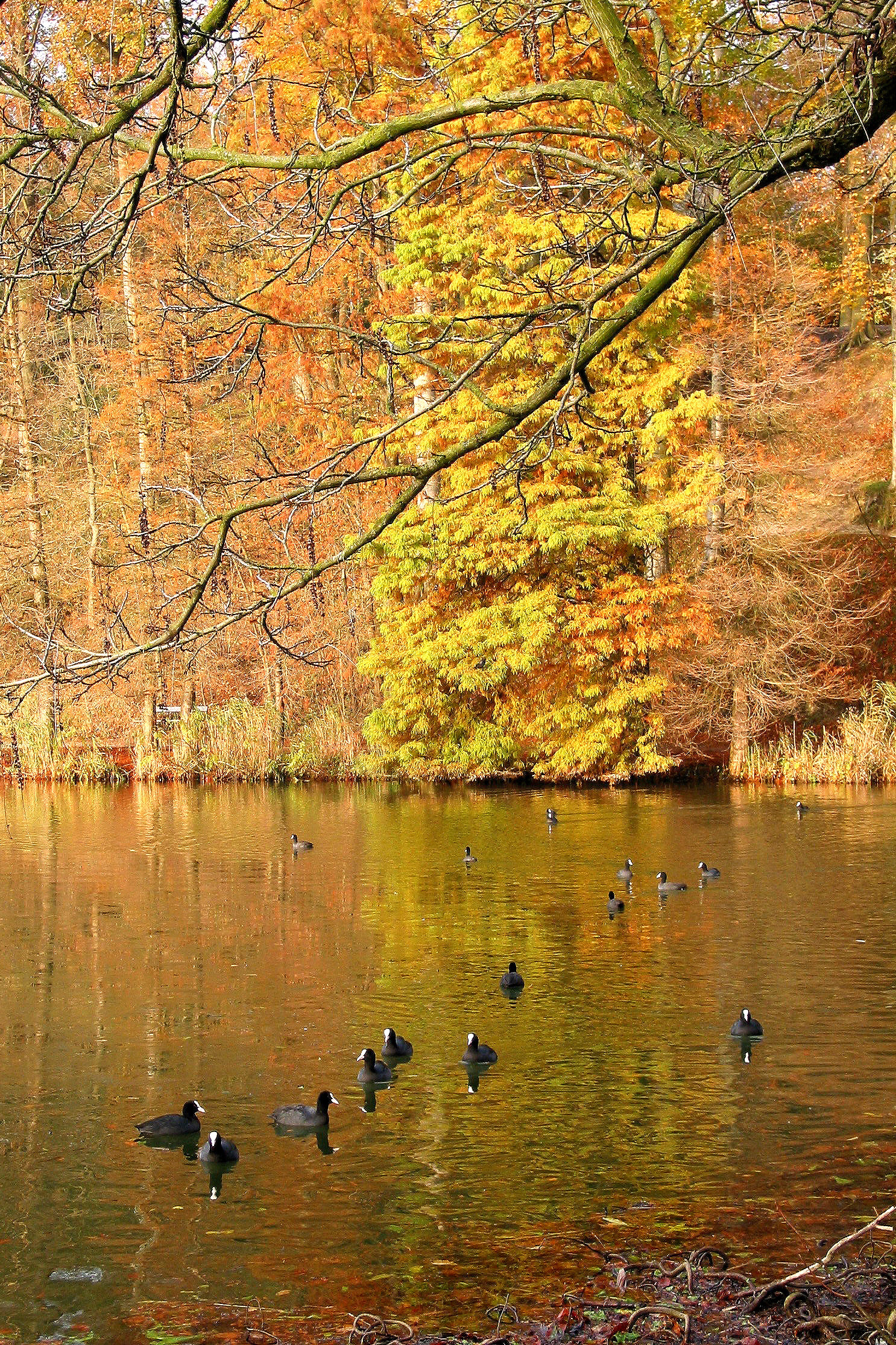 La Hulpe (Belgique) - Domaine Solvay - Foulques macroules (Fulica atra) sur l'étang de la Longue Queue.